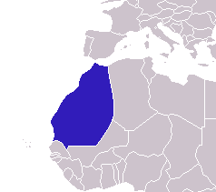 Carte Saadi